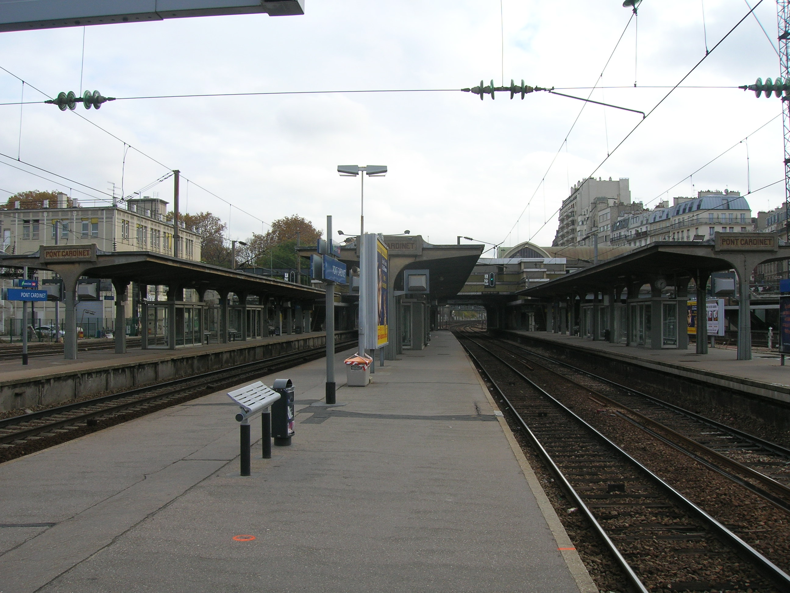 Gare de Pont-Cardinet côté quais, Paris